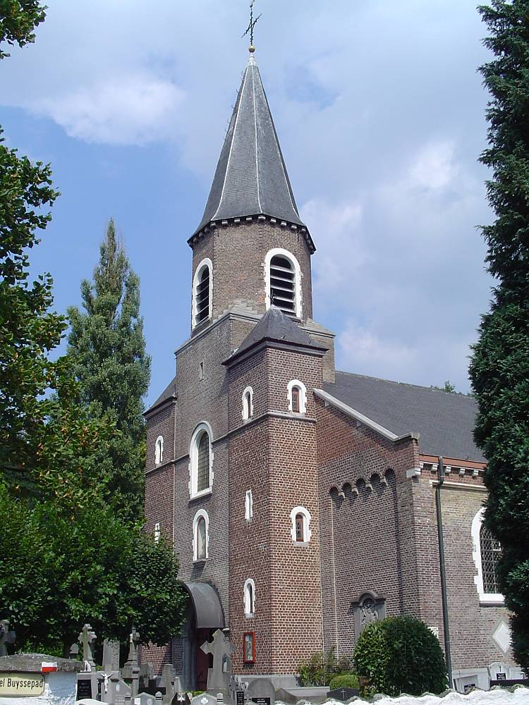 Sint-Aldegondiskerk van Deurle